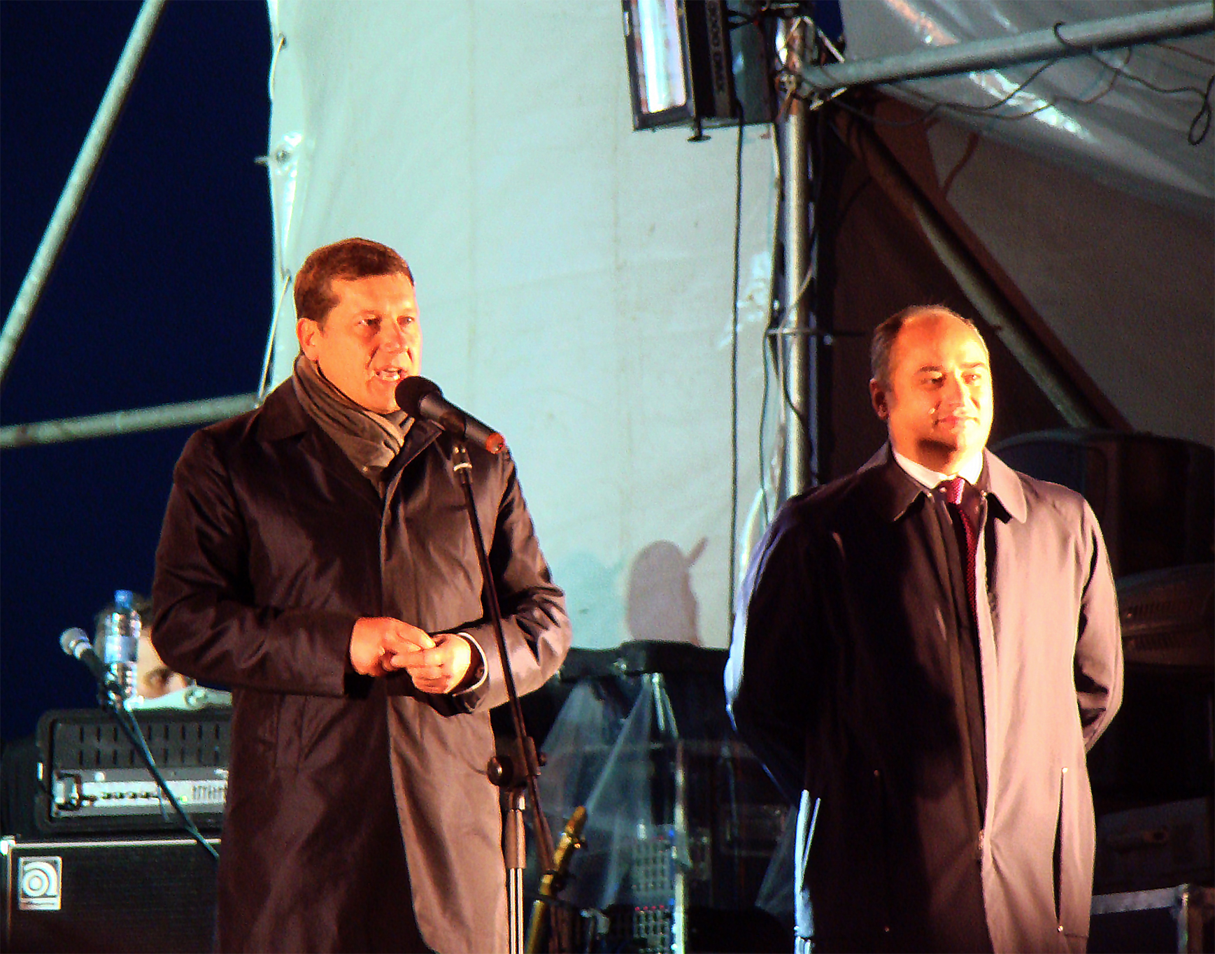 Нижний Новгород, площадь Минина и Пожарского. Два градоначальника - глава города Олег Сорокин и глава администрации Олег Кондрашов со сцены поздравляют горожан с Днём города (11.09.2011)